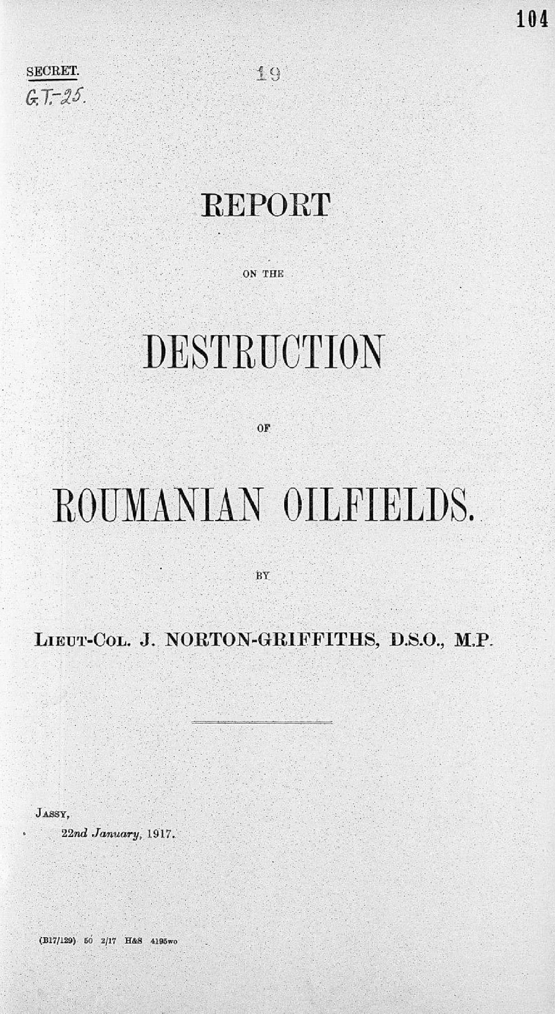 Coperta raportului scris la Iași de John Norton-Griffith la 22 ianuarie 1917, despre distrugerea instalațiilor industriale petroliere românești în 1916